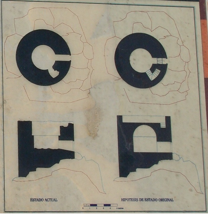 Fotografía de los paneles informativos colocados por la Diputación Provincial de Jaén, sobre una hipotética reconstrucción del estado original de la torre.